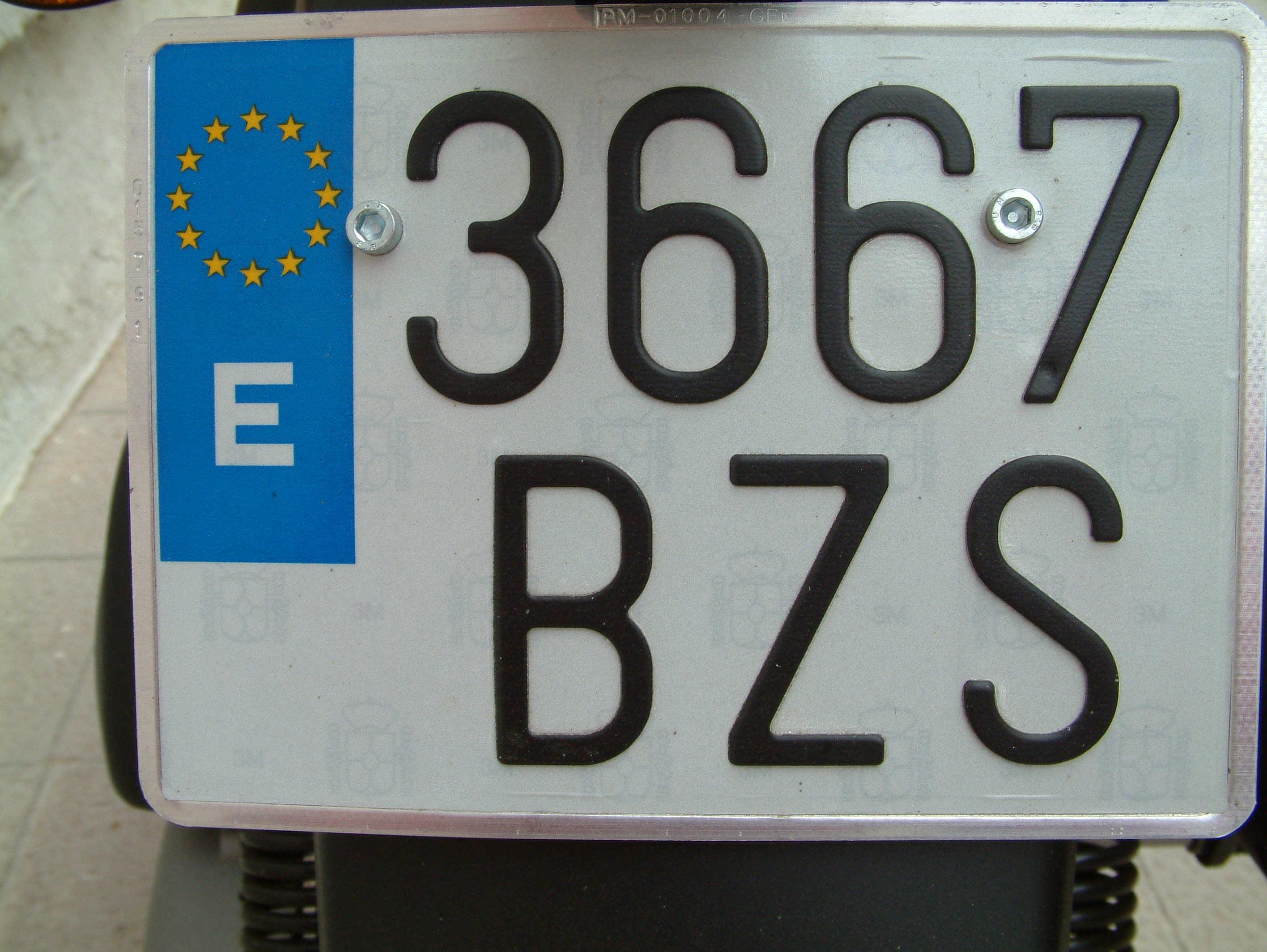 License plates of Spain